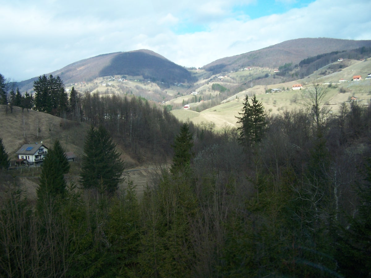 Майже весна